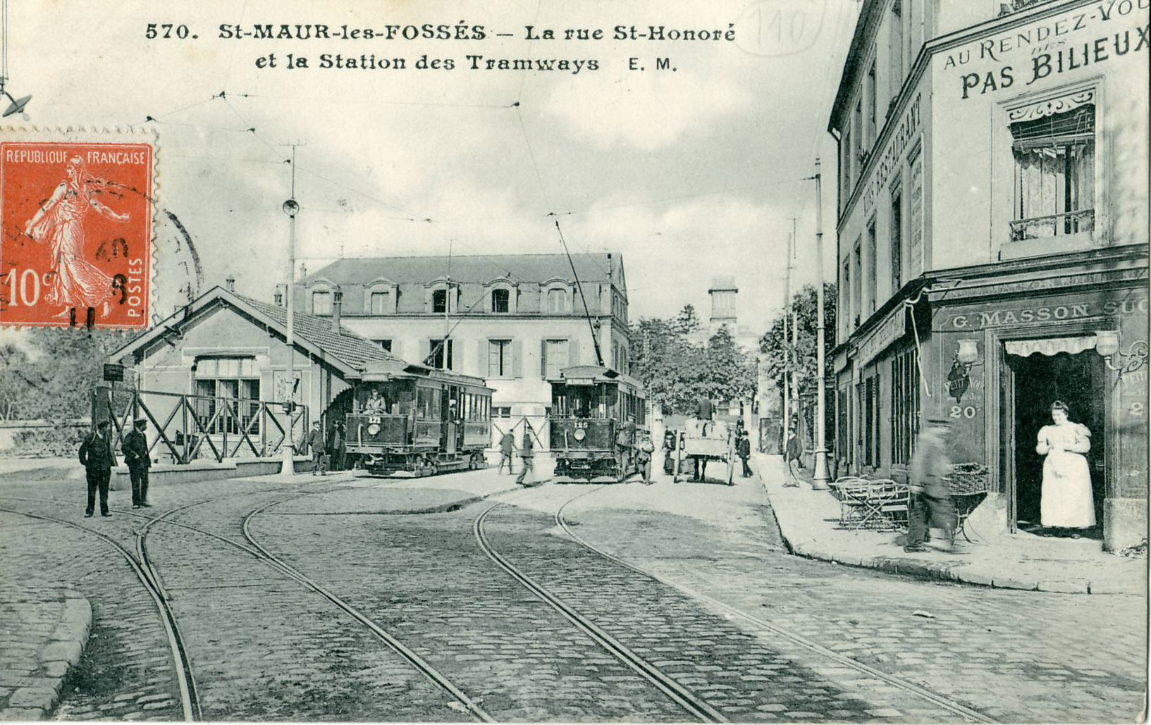 Carte postale ancienne éditée par EM N° 570Saint-Maur-des-Fossés : La rue Saint-Honoré et la Station des Tramways